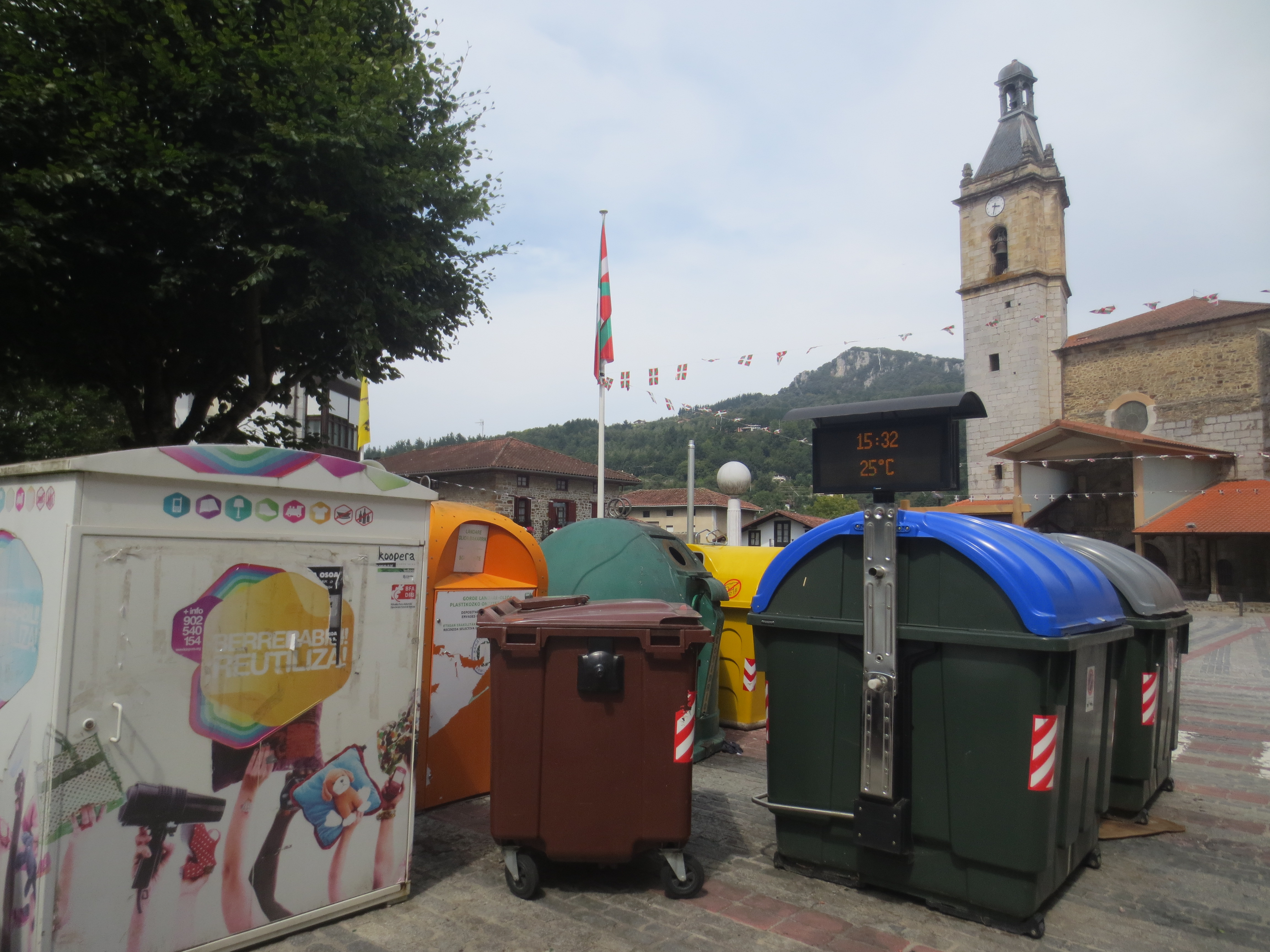 Edukiontziak Areatzako plazan.